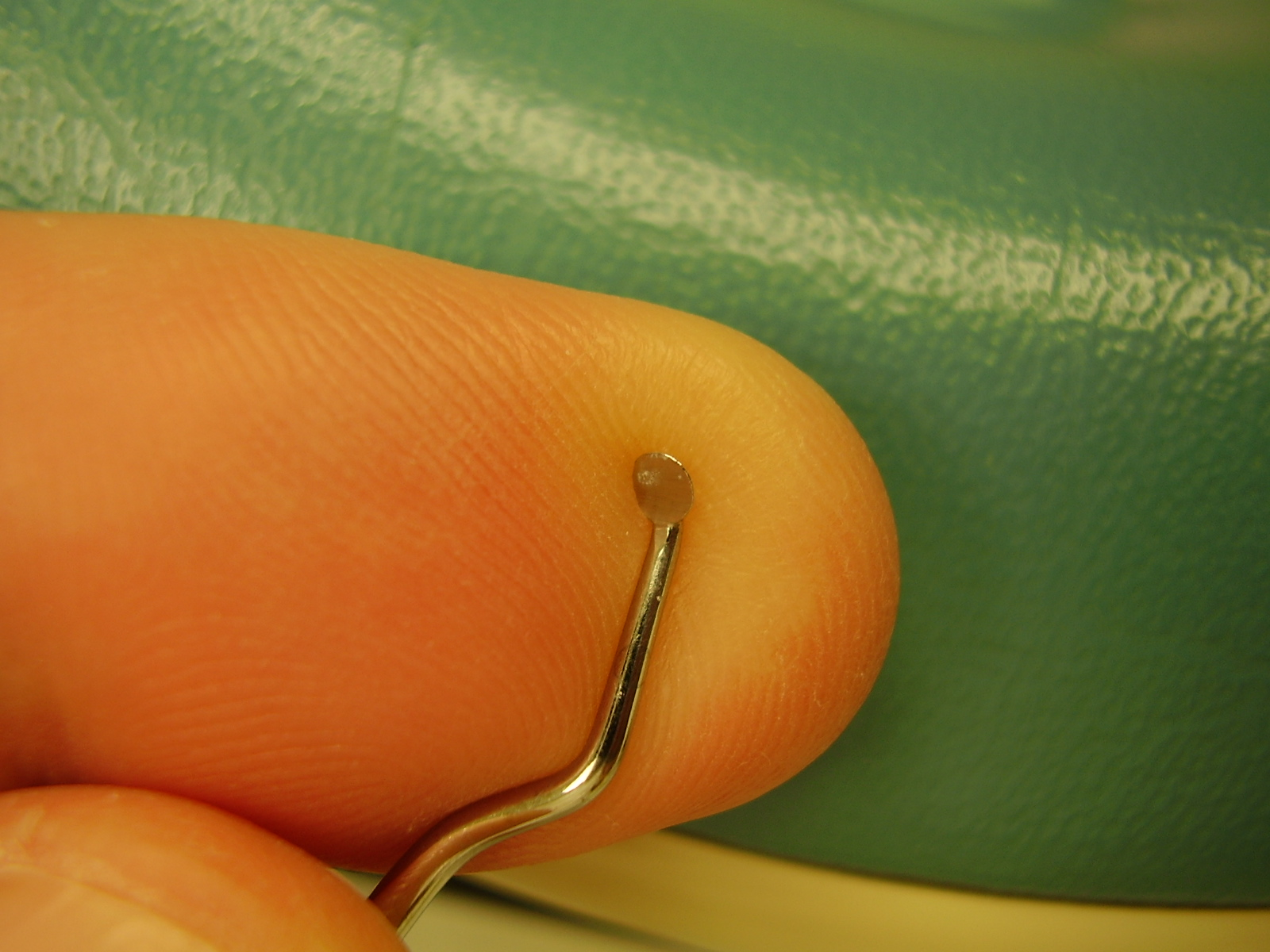 Excavator